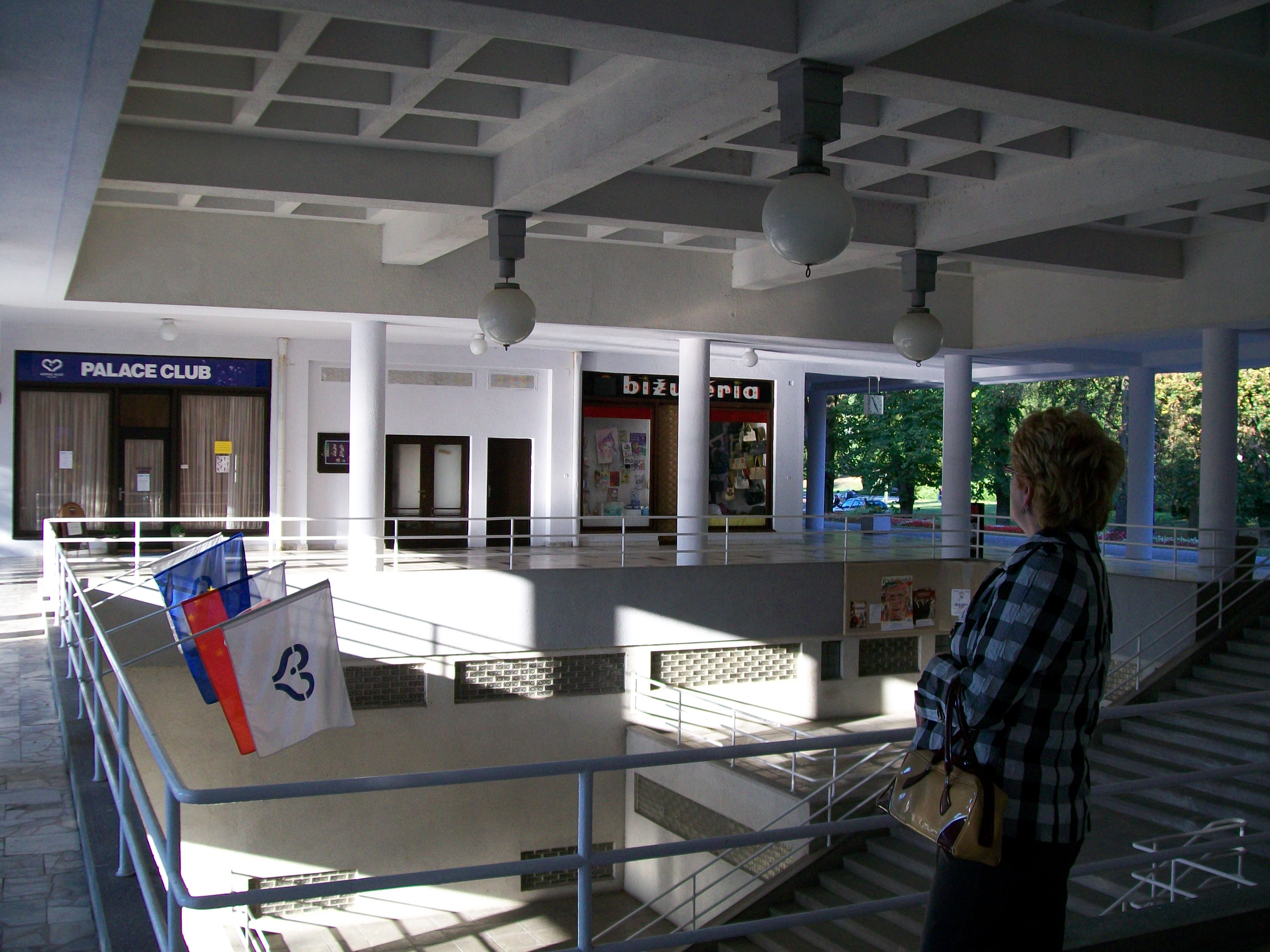 Hotel Palace v kúpeľoch Sliač